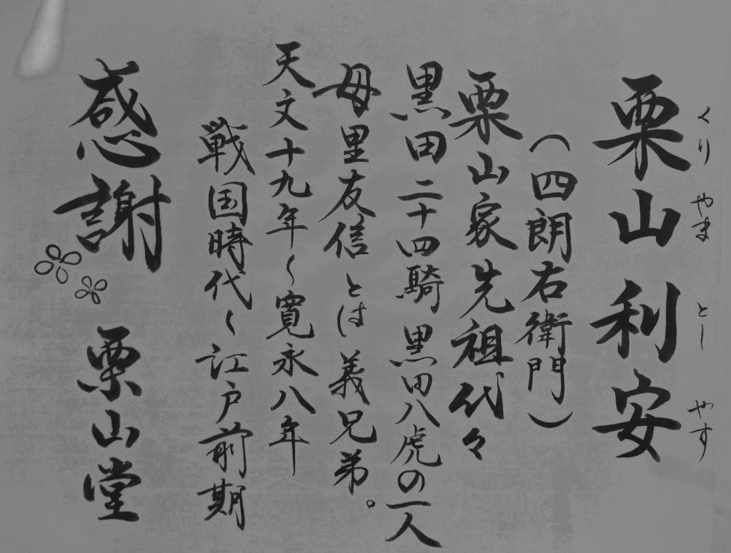 栗山善助の子孫が営む和菓子屋。